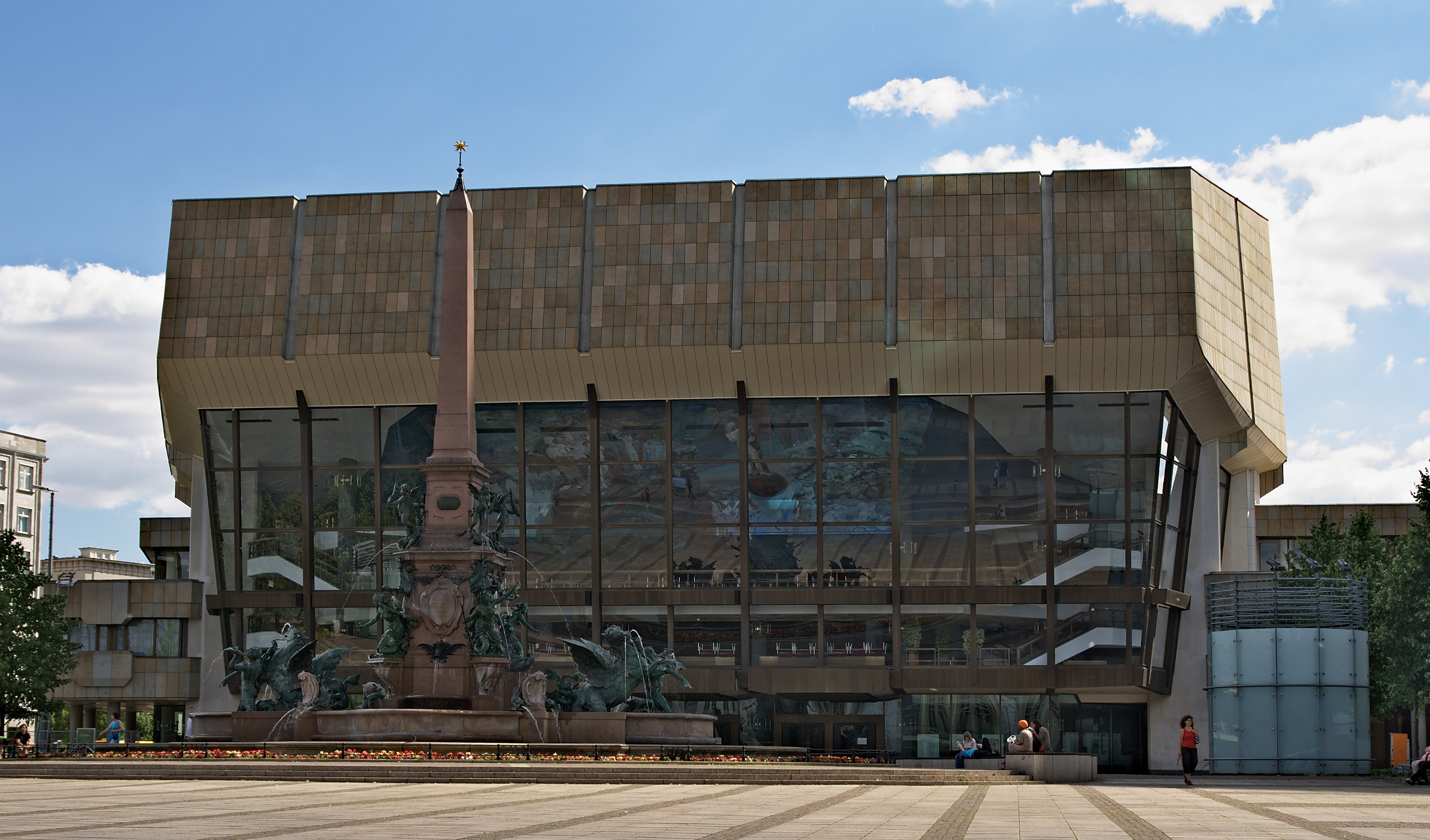 Neues Gewandhaus in Leipzig